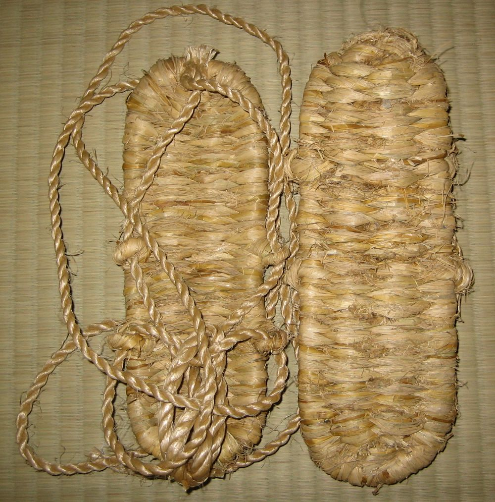 Waraji (japanese straw sandals)